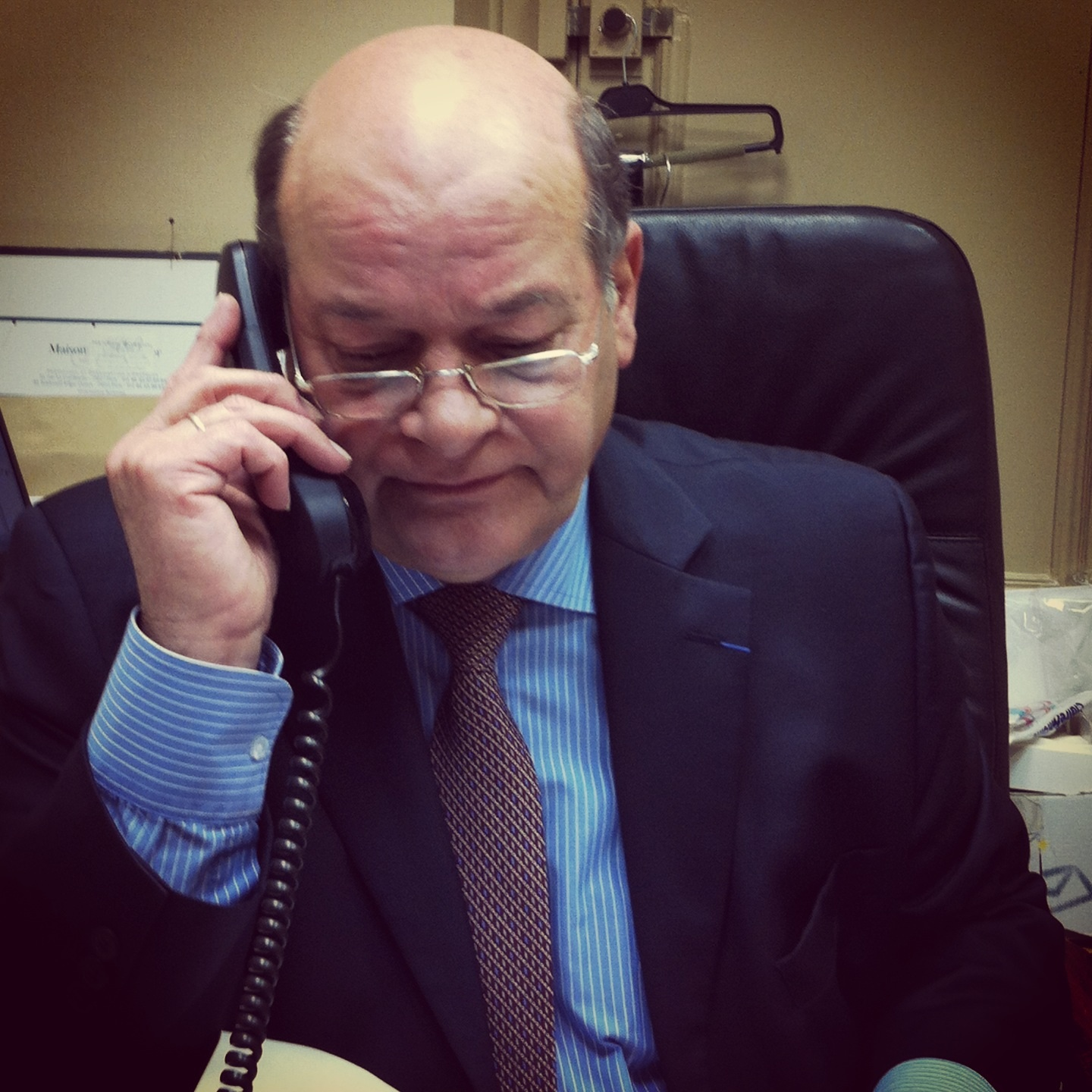 A son bureau Borniol